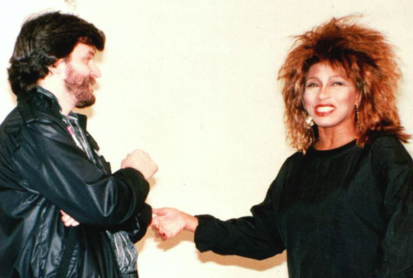 Veljko Despot i Tina Turner, 1985.